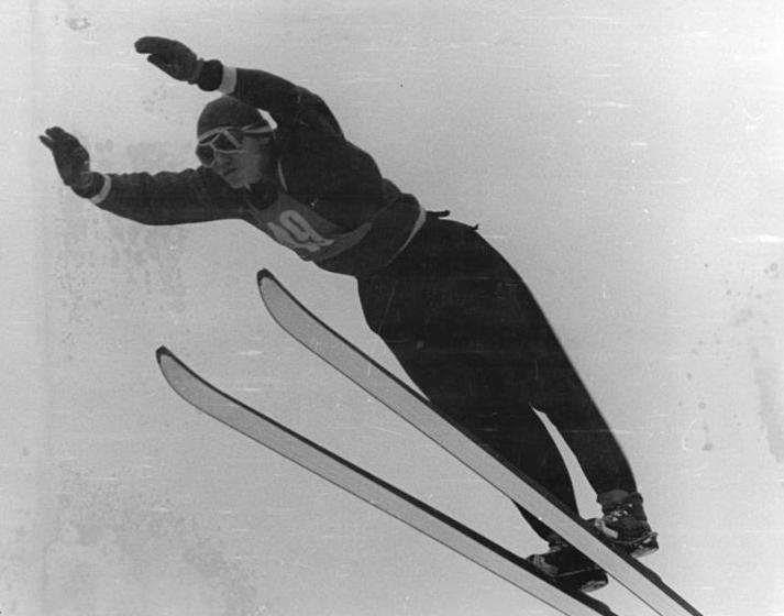 Zentralbild Wendorf 22.1.1959 DDR-Spezialsprungläufer UBz: Harald Pfeffer (SC Motor Zella-Mehlis).